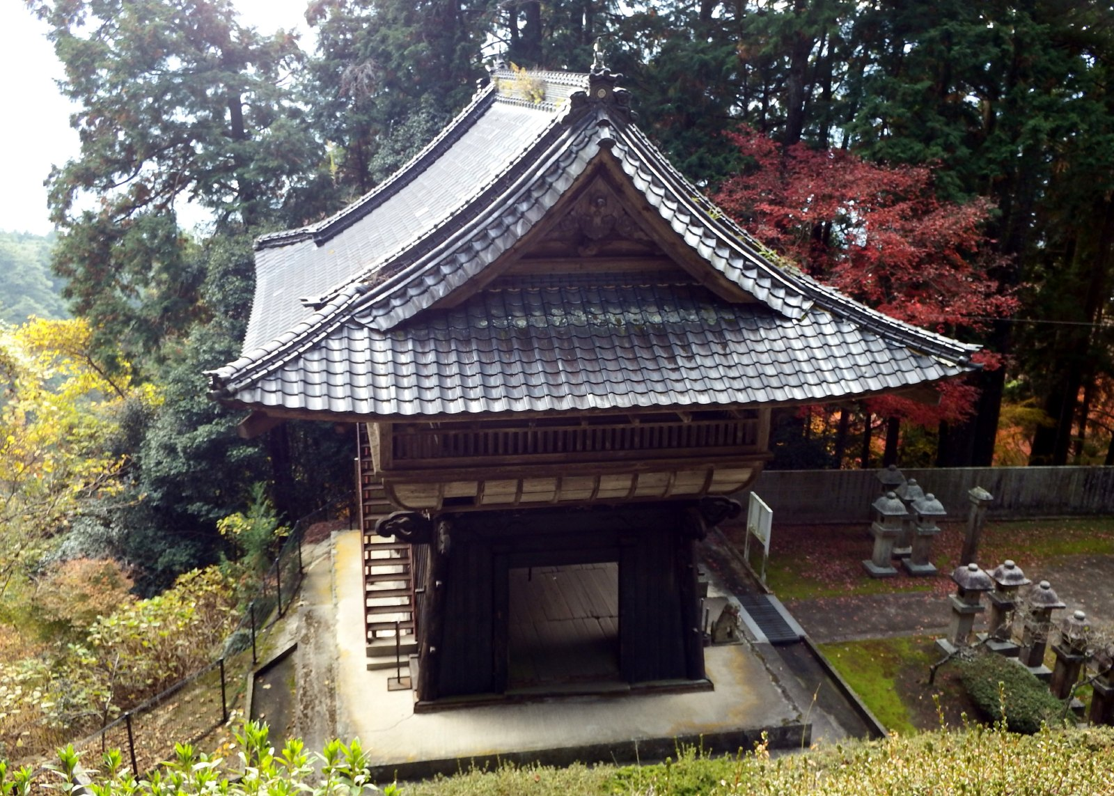 箸蔵寺の鐘楼堂